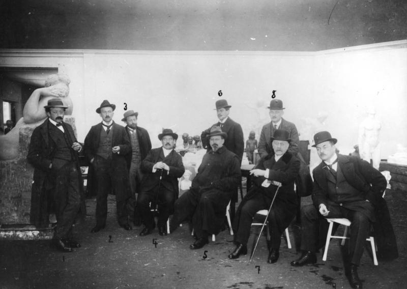 ADN-ZB/Archiv Berlin: die Jury der Berliner Sezessionsausstellung von 1911. V.l.n.r.: Walser, Rösler, Barlach, Corinth, Kraus, Baluschek, Mosson, von Kardorff, Breyer. 5515-11